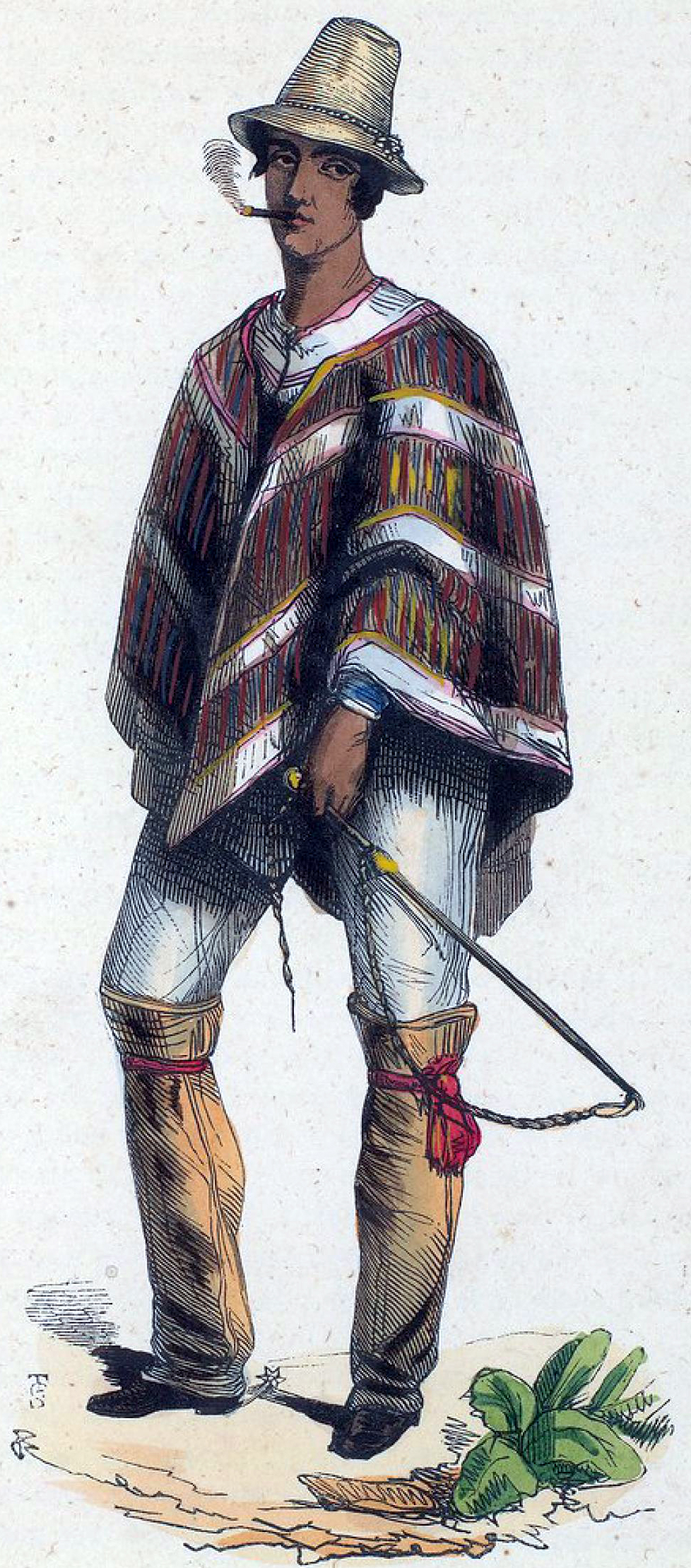 This is an original 1843 hand-colored woodblock print of a man from Chile.